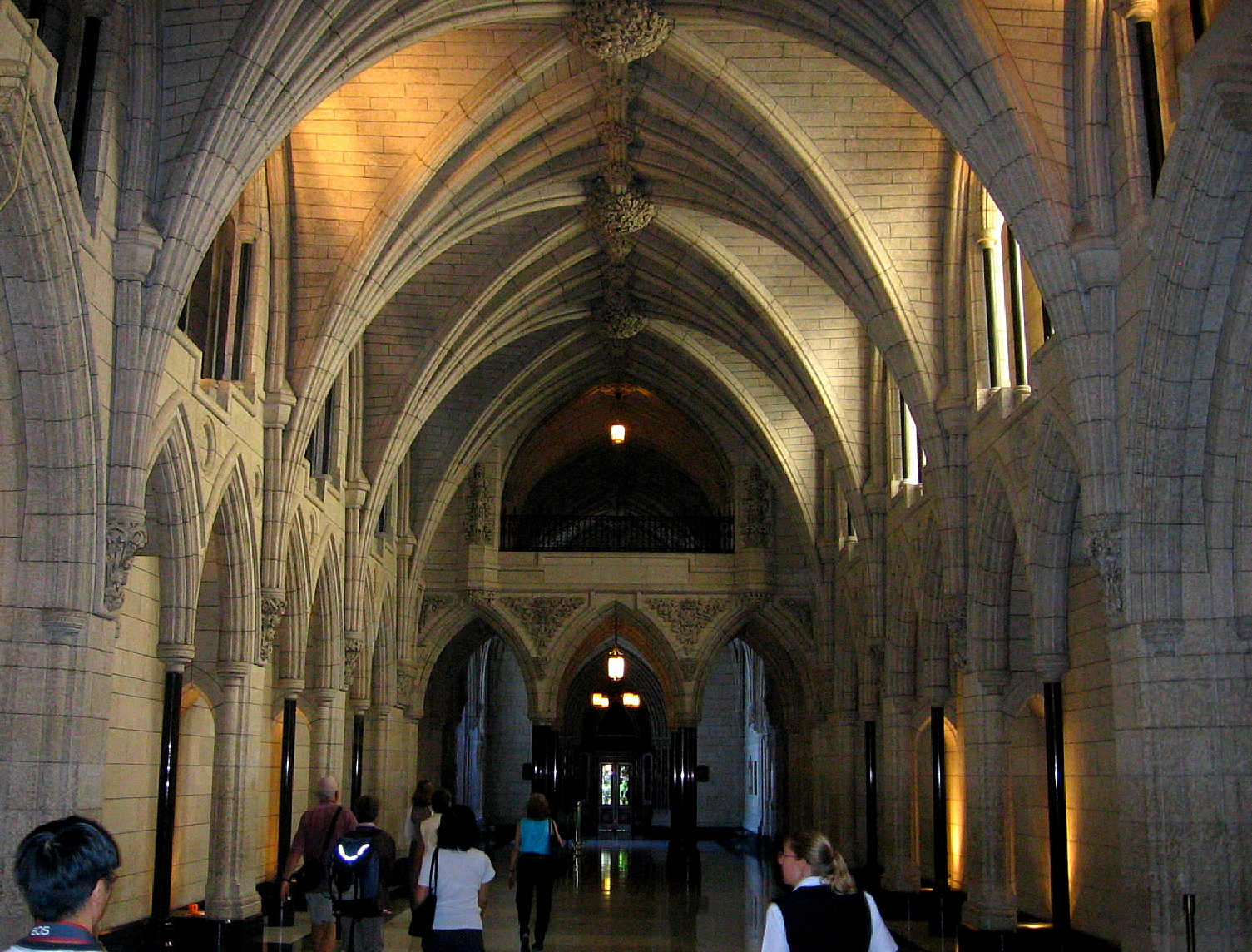 Hall d'honneur de l'édifice du Centre du Parlement du Canada - Hall of Honour in the Centre Block of the Parliament of Canada